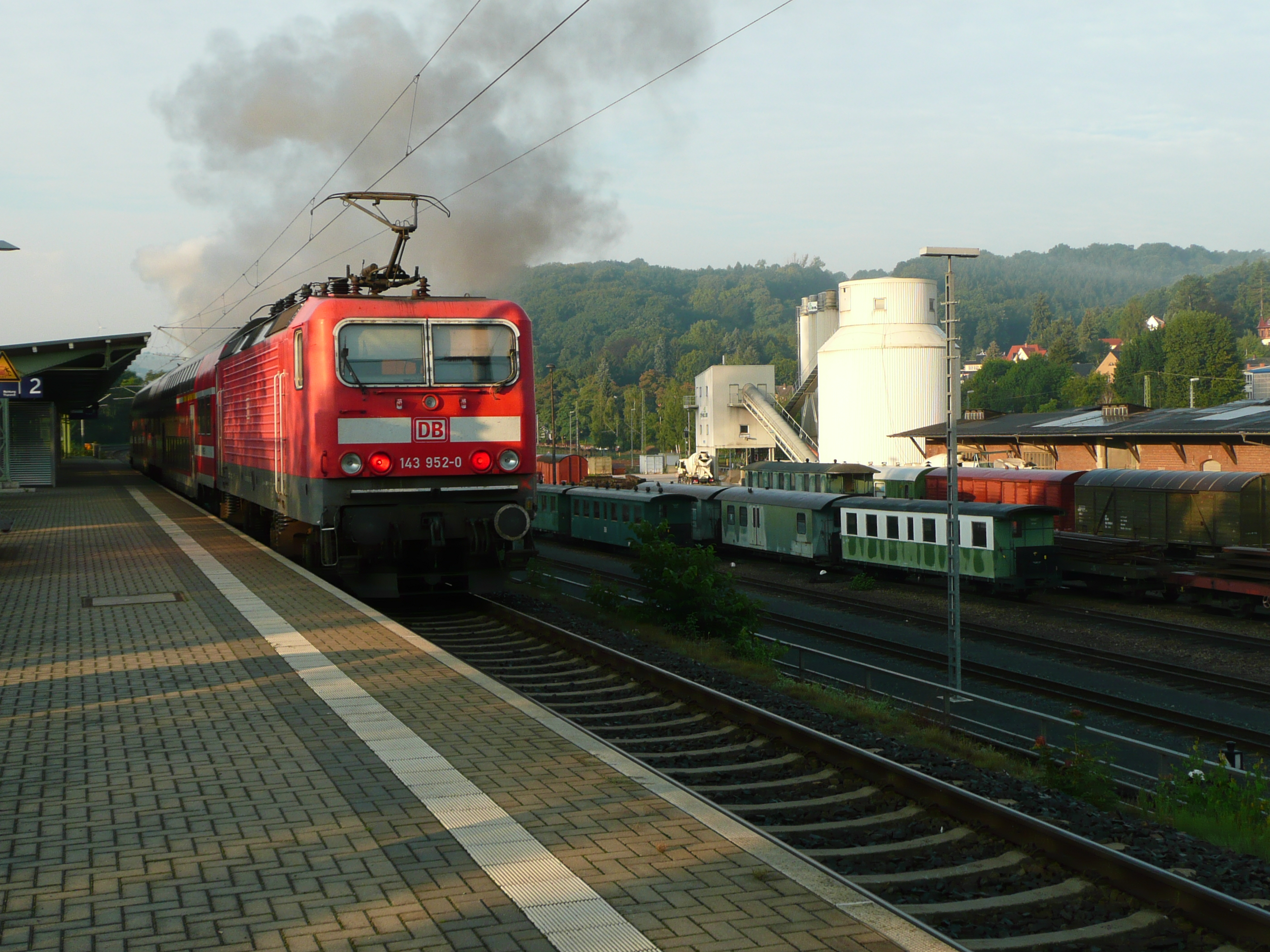 Anordnung der Personenzuggleise der Normalspurstrecke im Haltepunkt Freital-Hainsberg